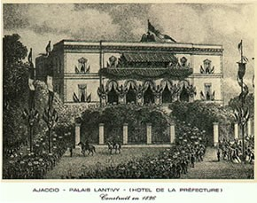 Illustration du palais Lantivy, qui était alors la Préfecture de Corse en 1837.